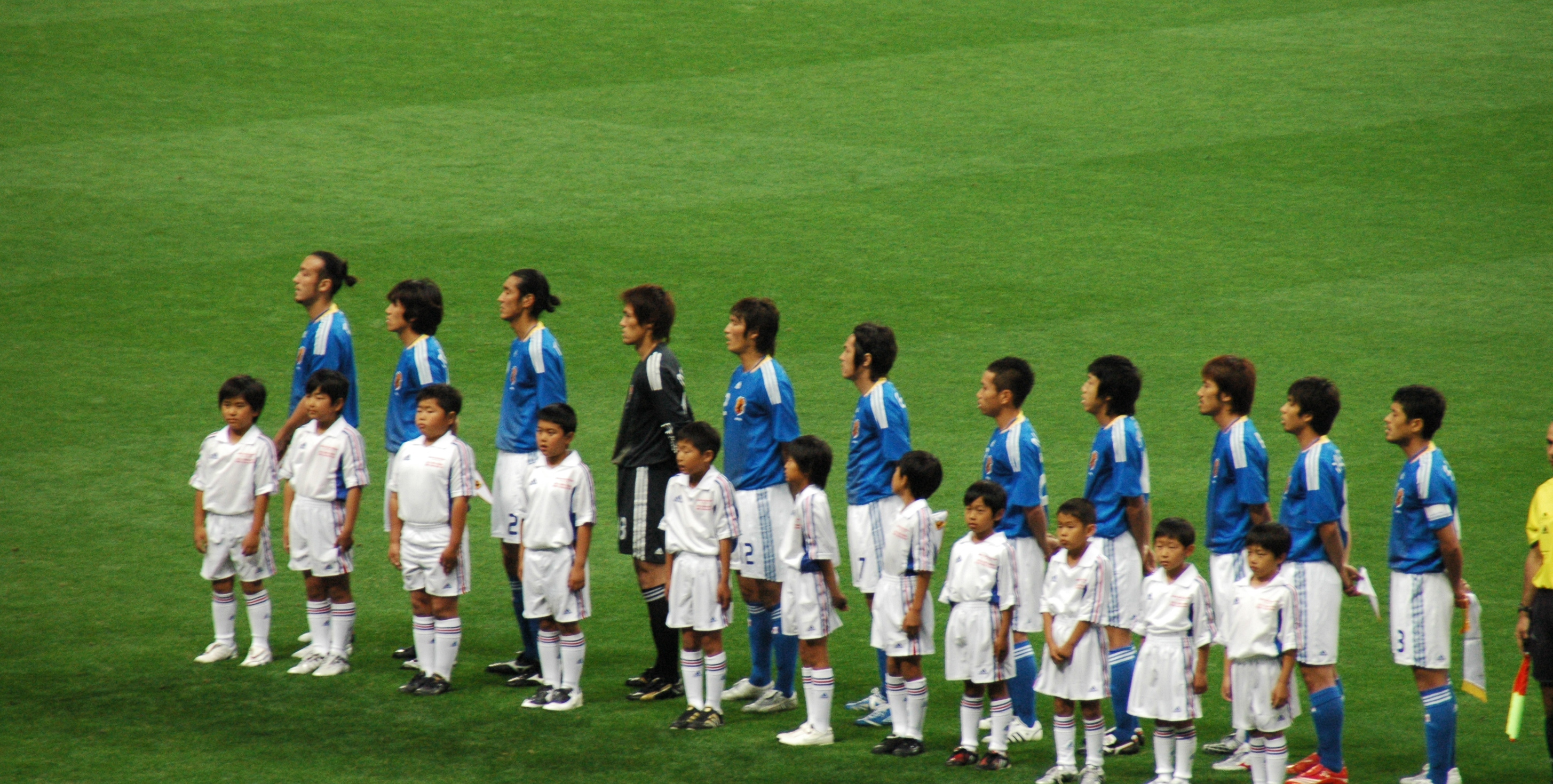 Japan NT at Saitama Stadium